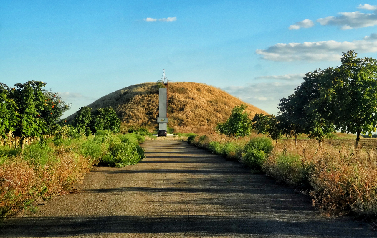 Нечаева могила